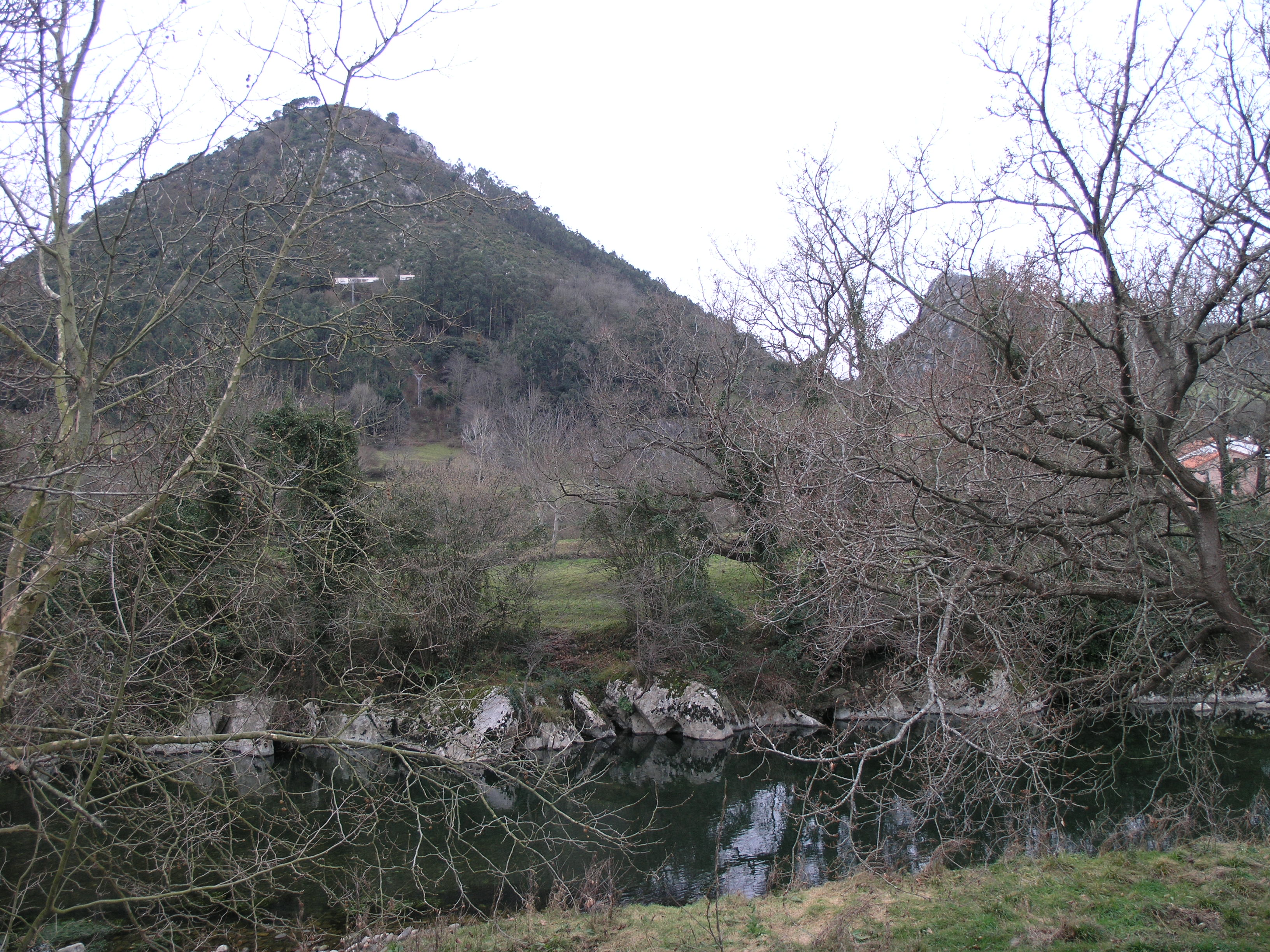 Monte o Pico Castillo (355 m), con el río Pas en primer término, en cuyas laderas se encuentran las cuevas de Puente Viesgo. Se puede subir desde Puente Viesgo, a través del PR-S.17.